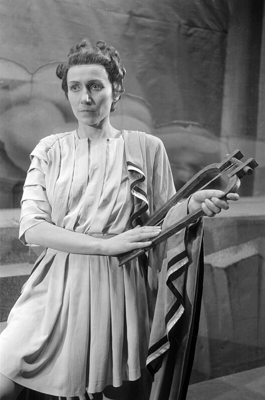 Original image description from the Deutsche Fotothek Schluss-Szene und Rollenporträts, Anneliese Müller als Orpheus und Tiana Lemnitz als Eurydike